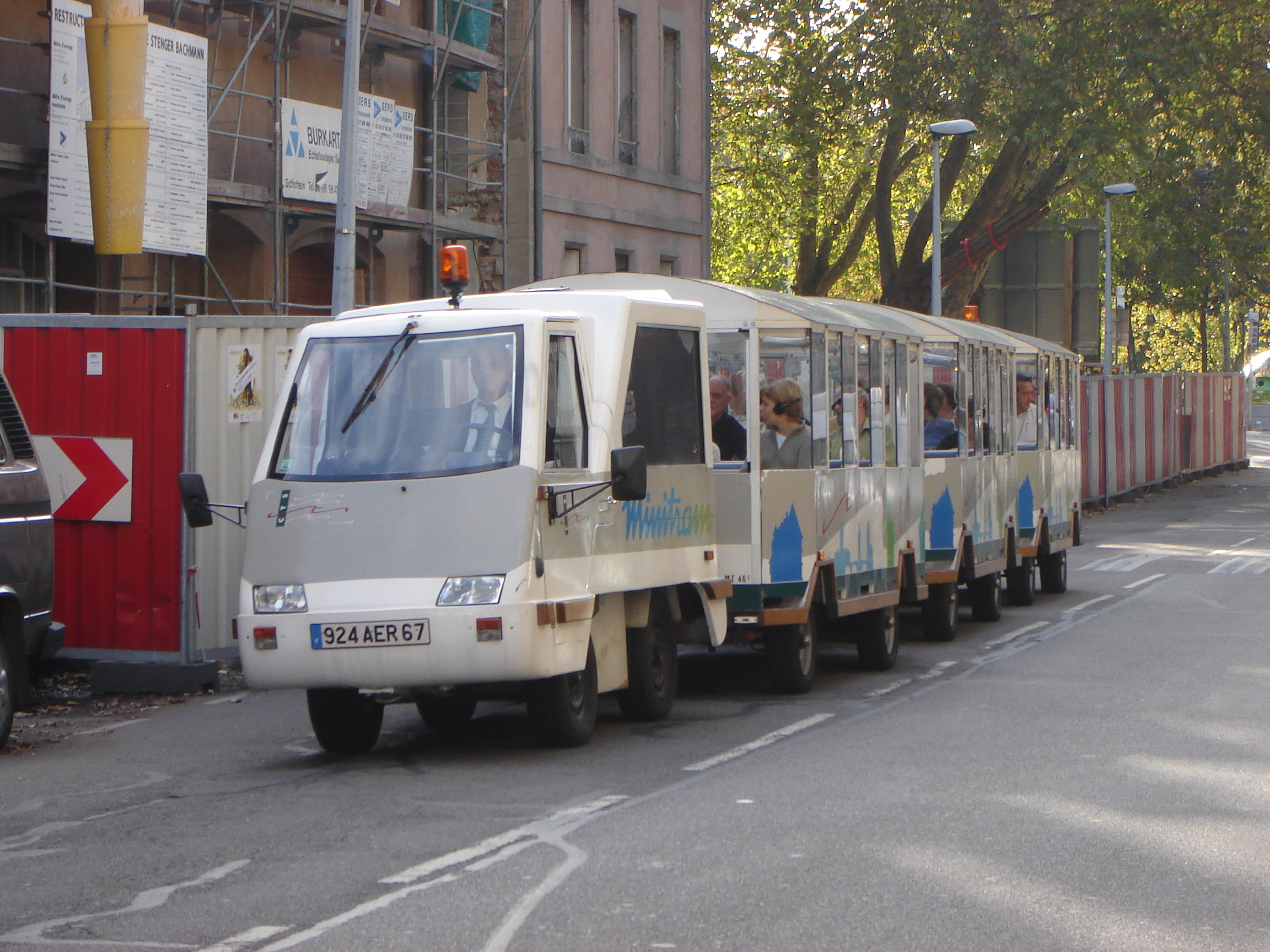 Mini tram (appellation locale du Train routier touristique) de Strasbourg